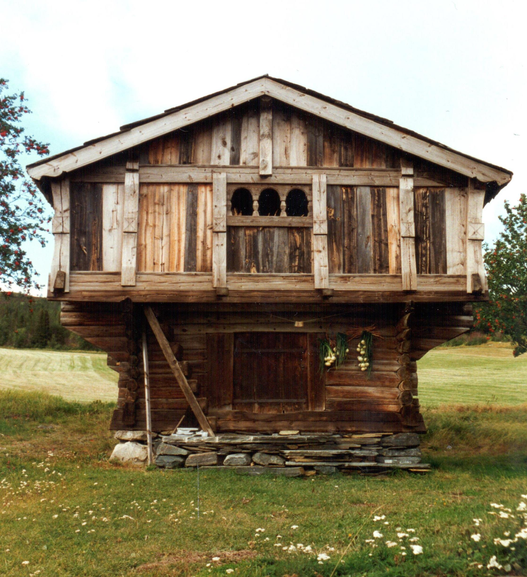 Loft på Valbjør i Vågå